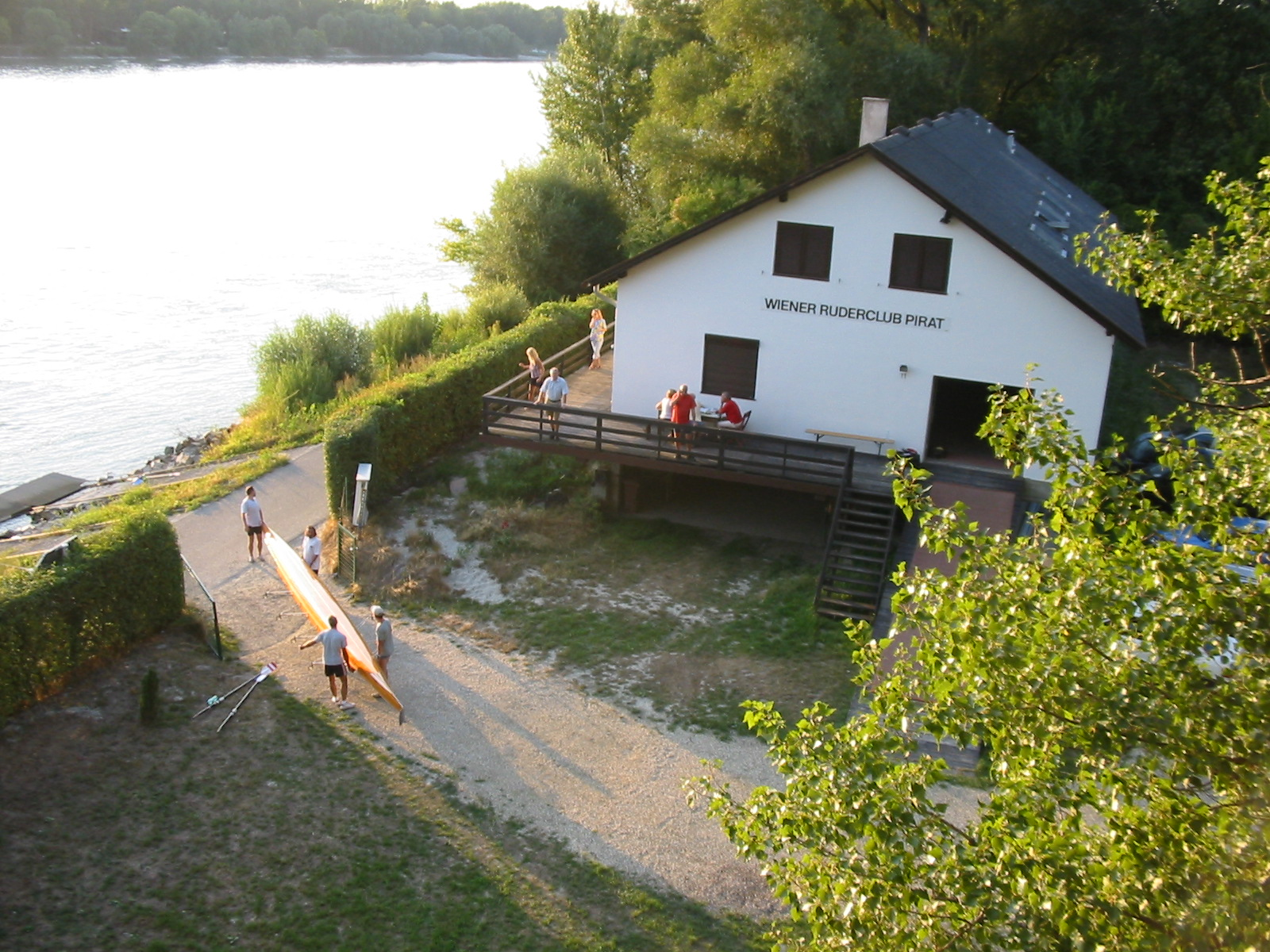 Bootshaus Langenzersdorf